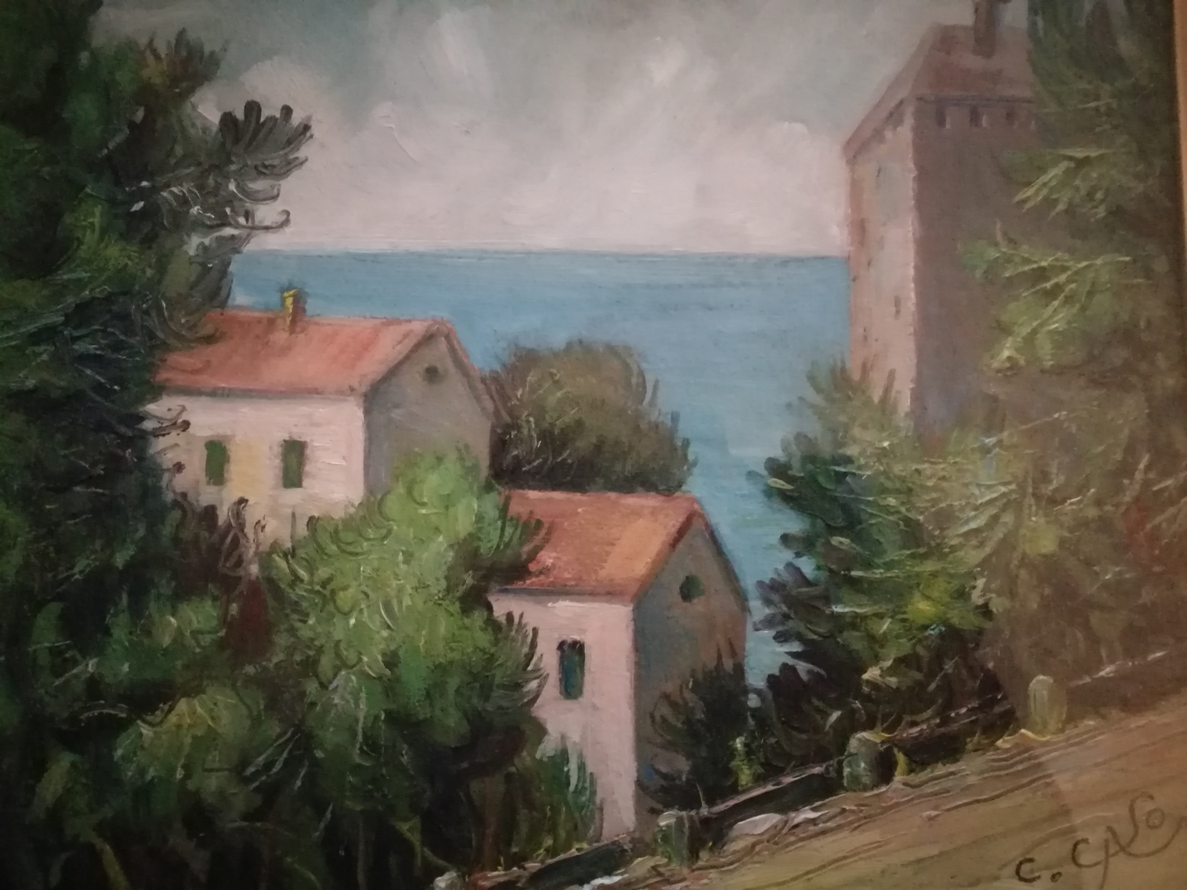 Olio su tela